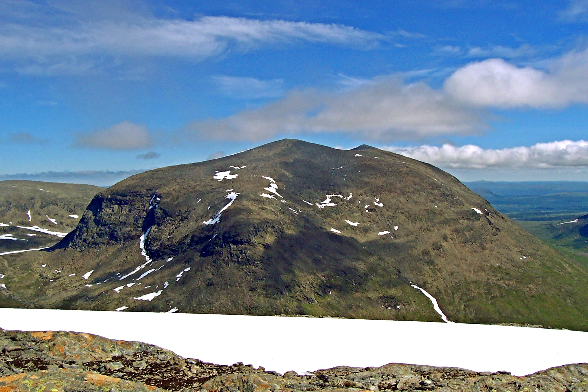 Norra Sytertoppen i Vindelfjällen